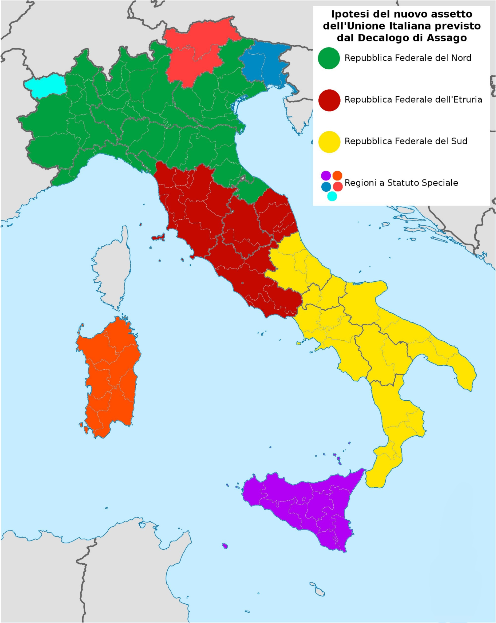 Ipotesi del nuovo assetto istituzione previsto nel Decalogo di Assago da Gianfranco Miglio